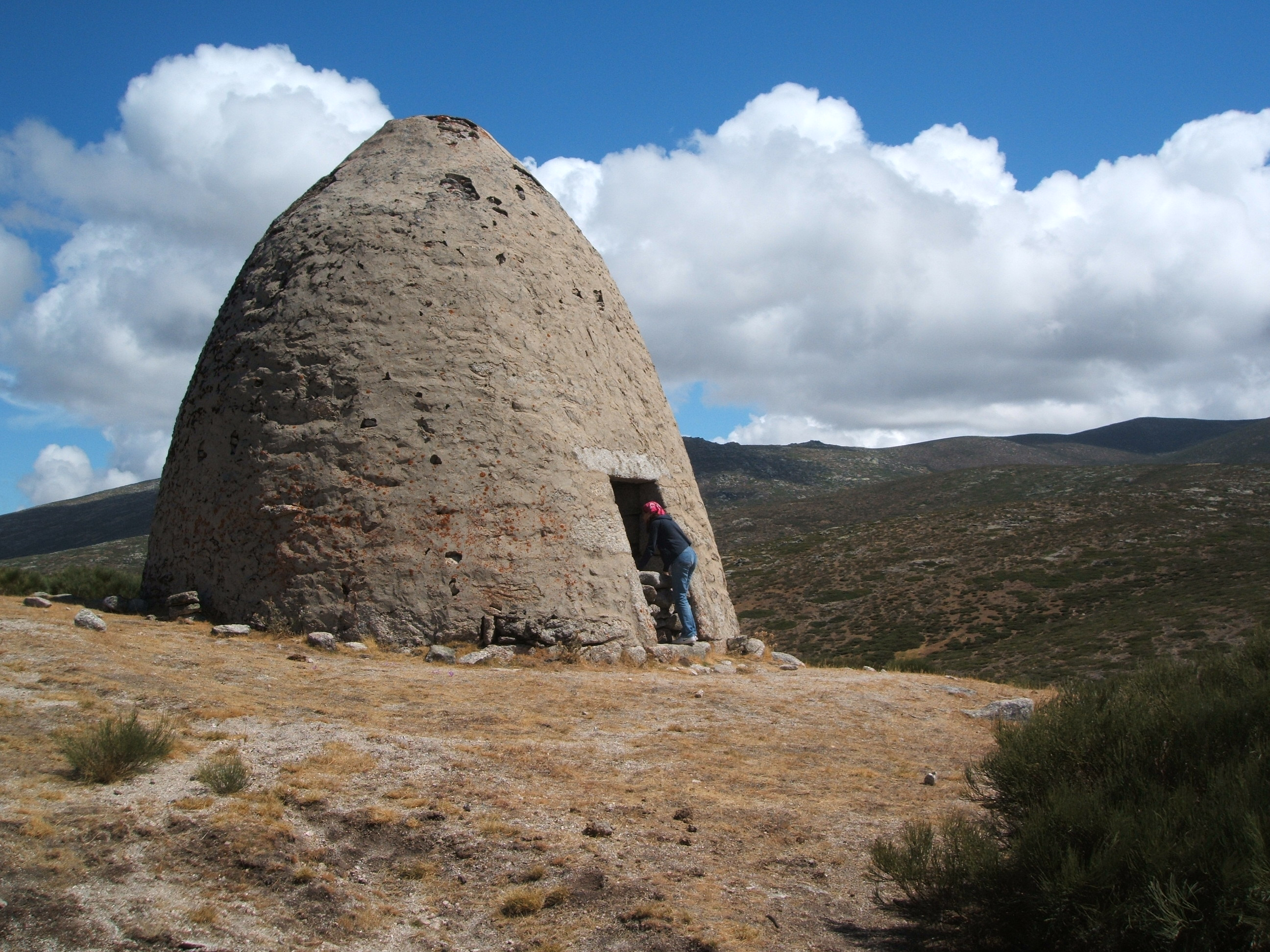 El Chozo Blanco en La Serrota. Villafranca de la Sierra (Ávila, España). AUTOR: Alfredo (con permiso del autor).